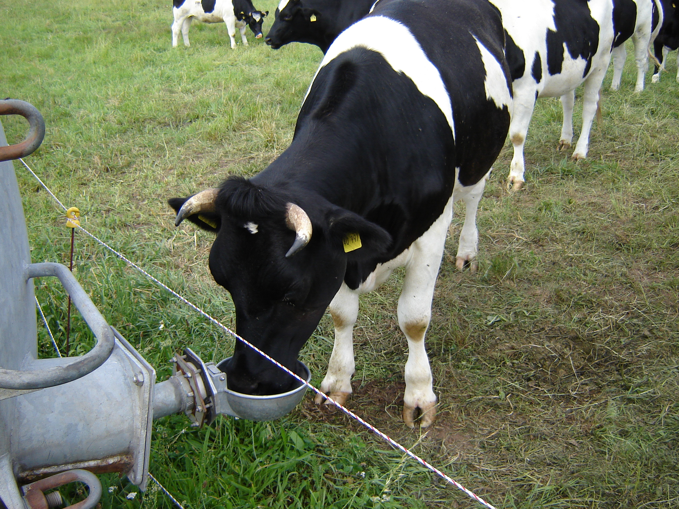 Rind bei der Nutzung einer Tränke, Hofgut Oberfeld, Darmstadt, Deutschland